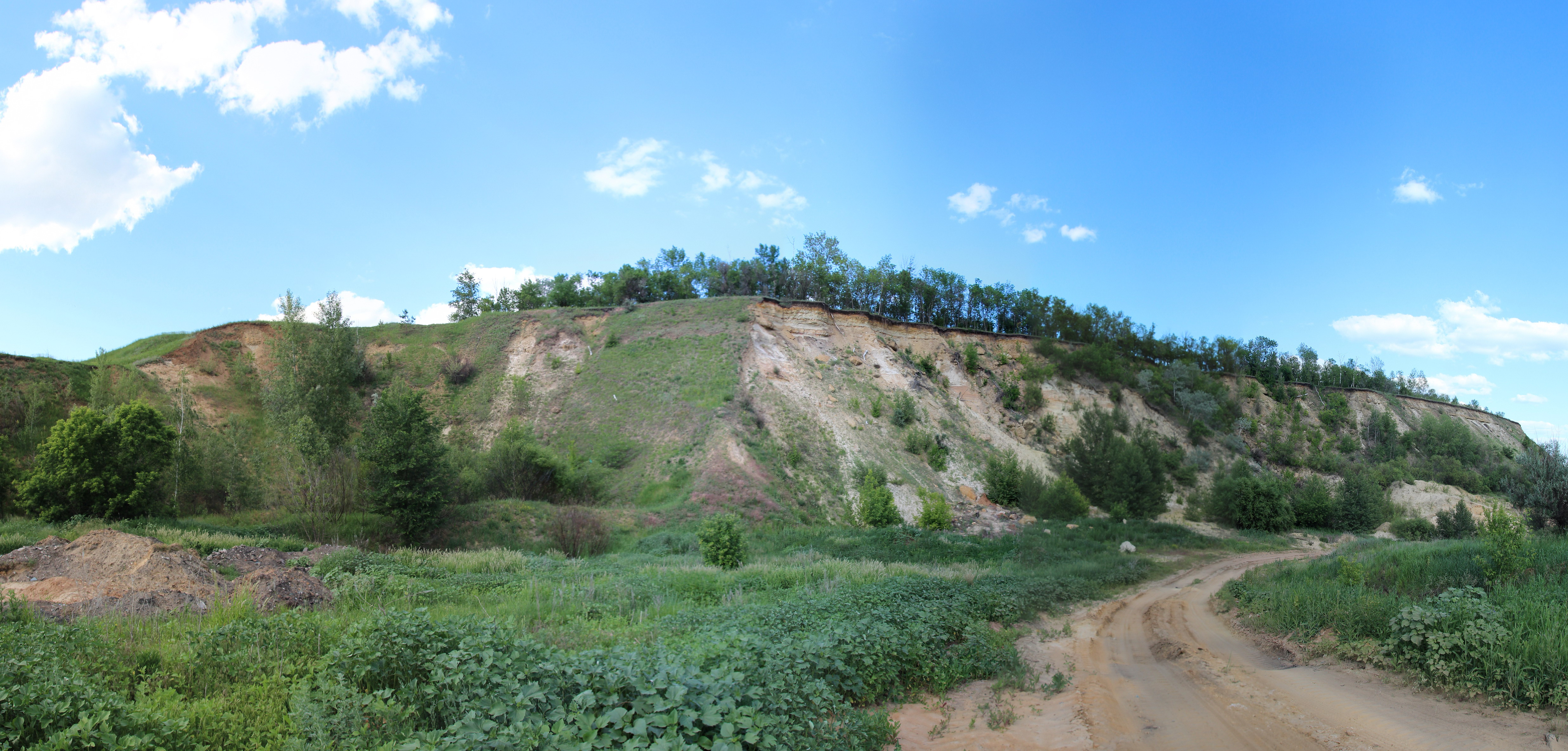 Верхний Карачан: У с. Верхний Карачан,Грибановский район, Воронежская область This image is related to the protected area of Russia number 3610092